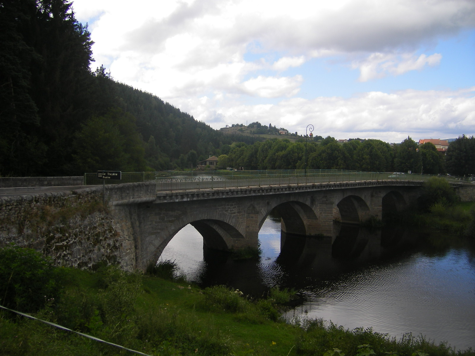 Le Malzieu-Ville - Bridge on Truyère River